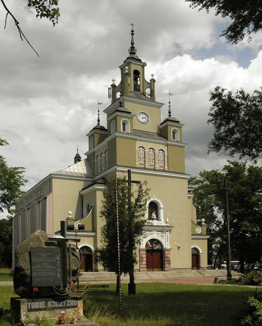 Kościół - widok z ul.Krakowskiej.